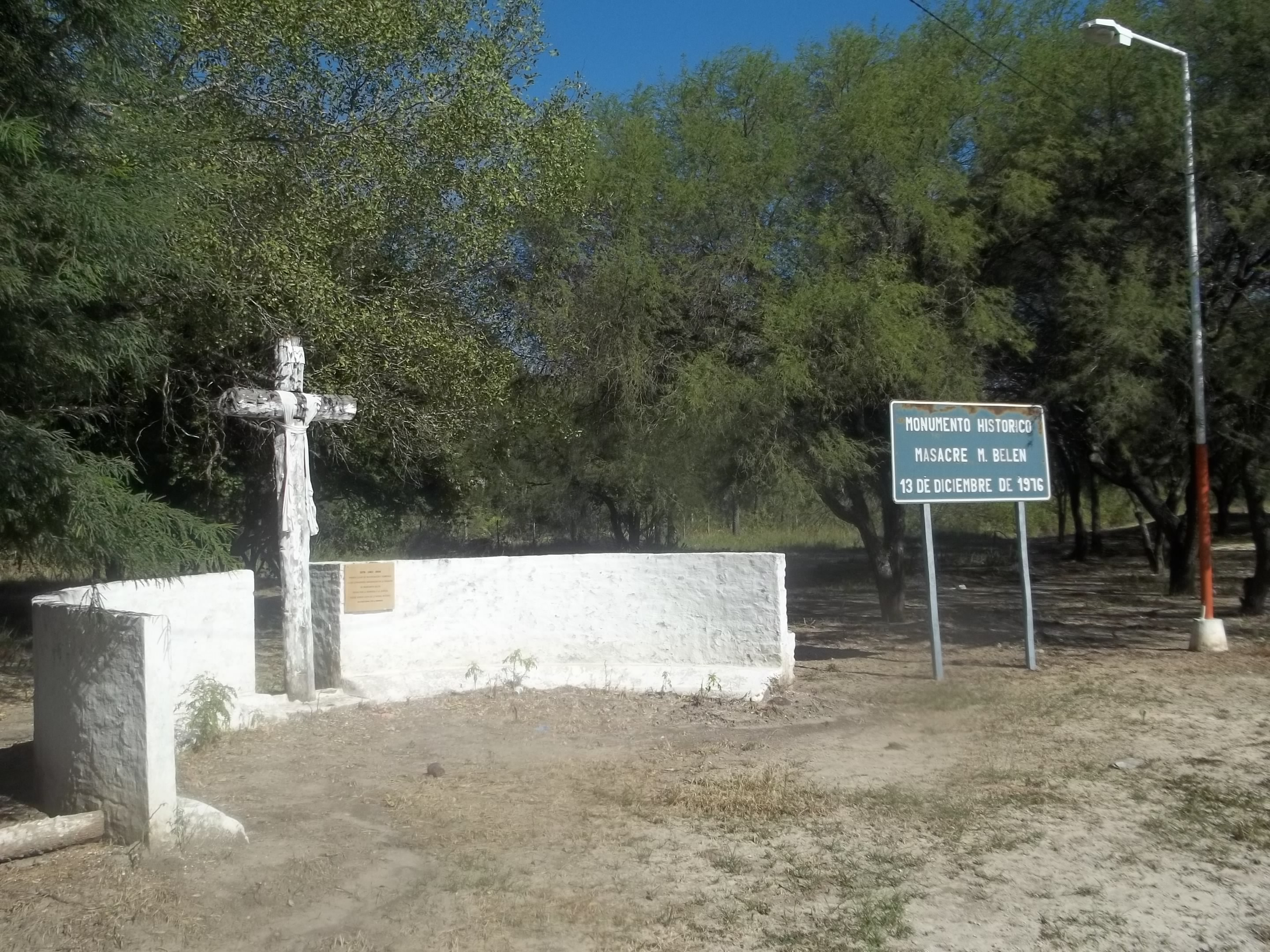 Primer monumento a los caídos de Margarita Belén, 50 metros al sur del actual.